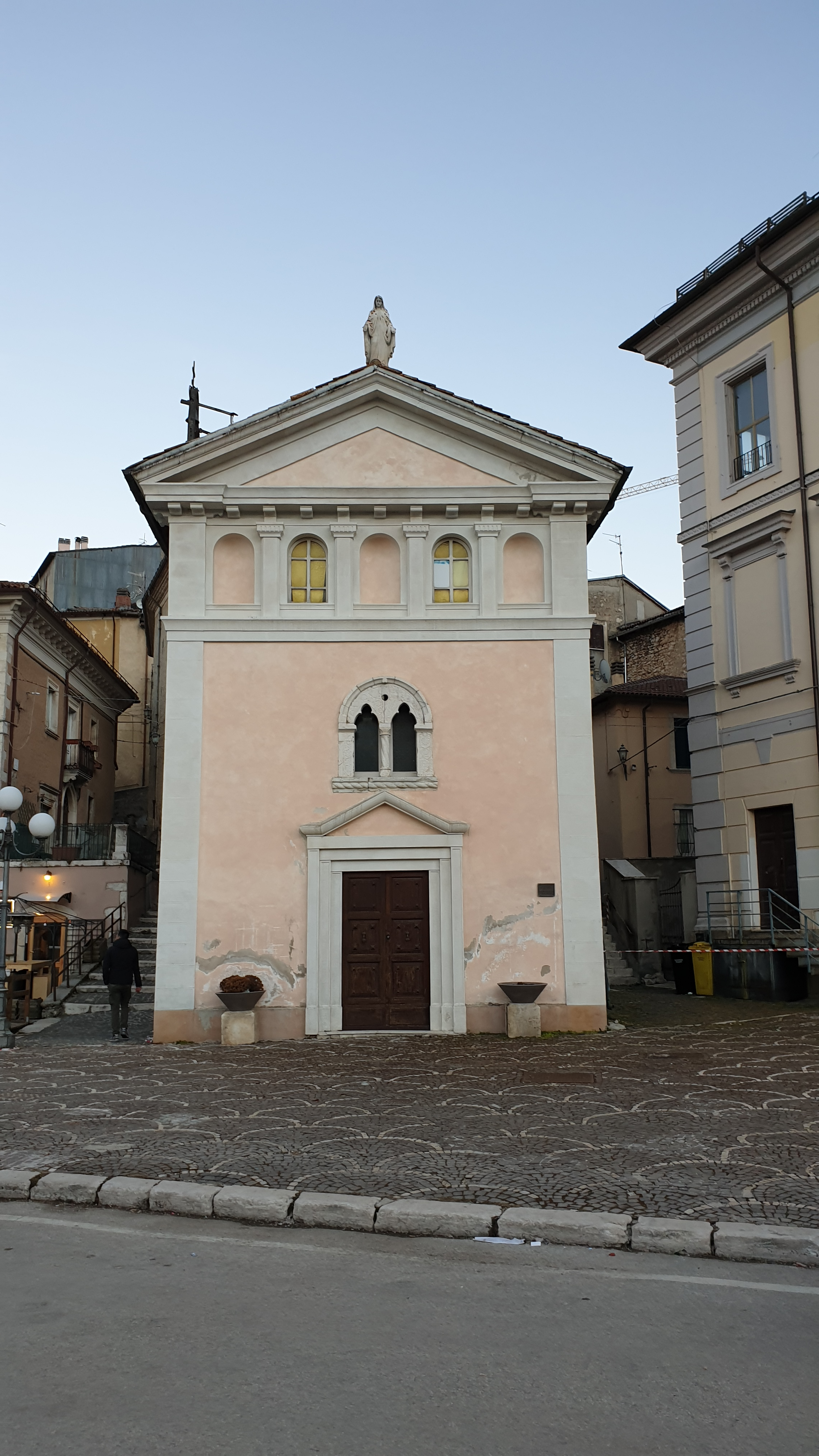 Chiesa di San Michele Arcangelo (Rocca di Mezzo)